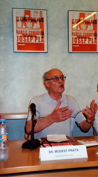 Modest Prats en l’acte d’inauguració de l’exposició “El temps que fuig. Narcís Comadira – Josep Pla” . Palafrugell, Fundació Josep Pla, 21 de juny de 2003